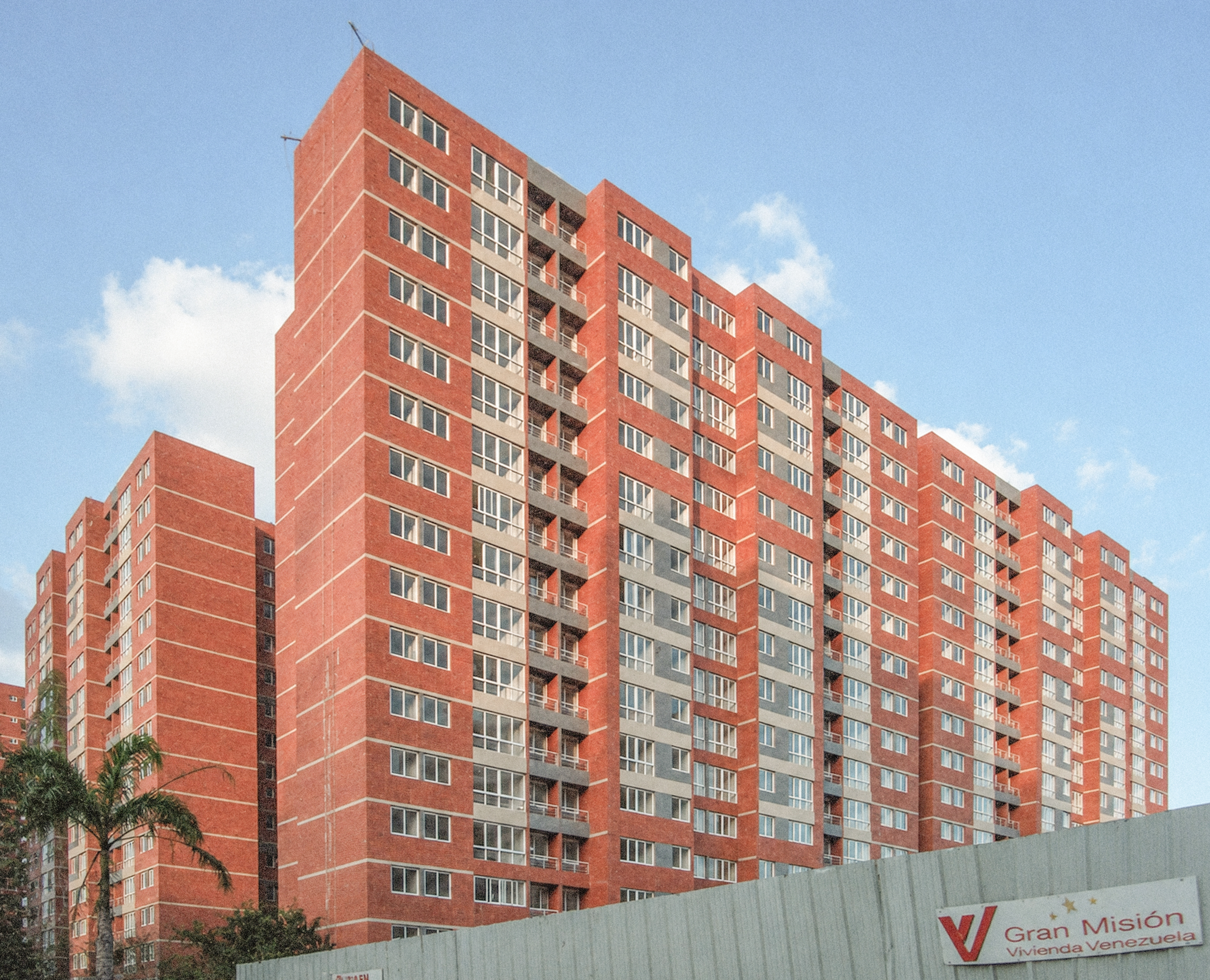 Misión Vivienda en Fuerte Tiuna, Caracas